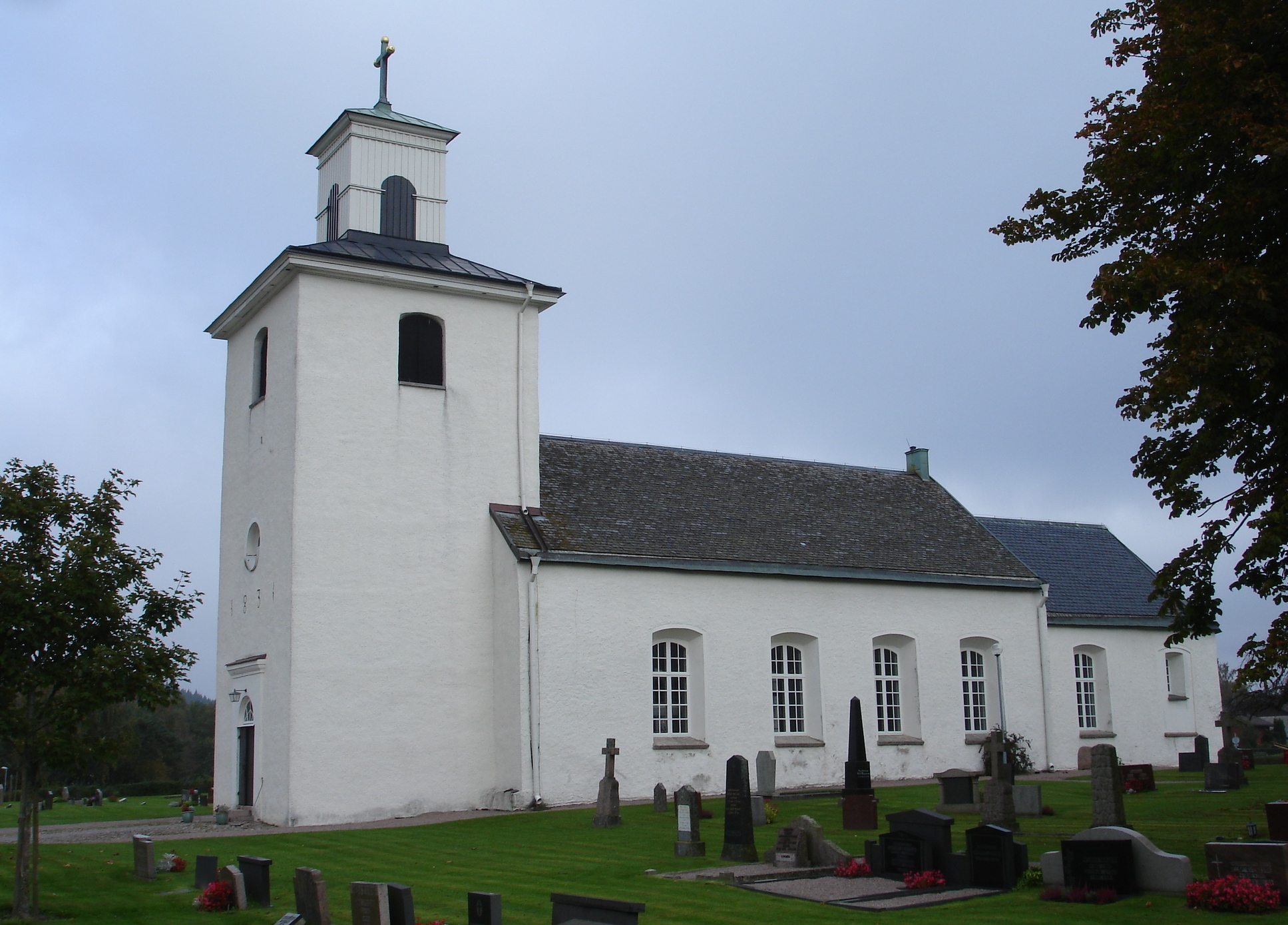 Kvibille kyrka, Halmstads kommun